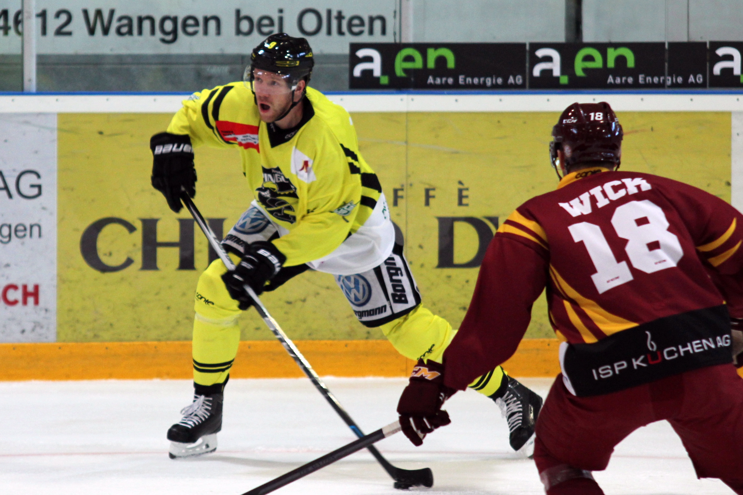 Marcel Müller (K 9), Jeremy Wick (G 18).